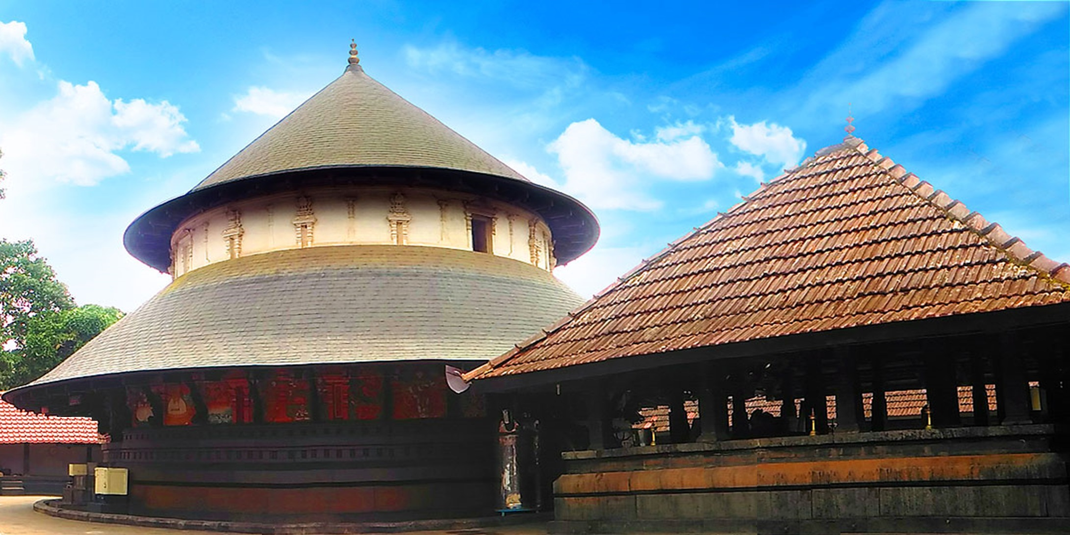 ചൊവ്വല്ലൂർ ശിവക്ഷേത്രം